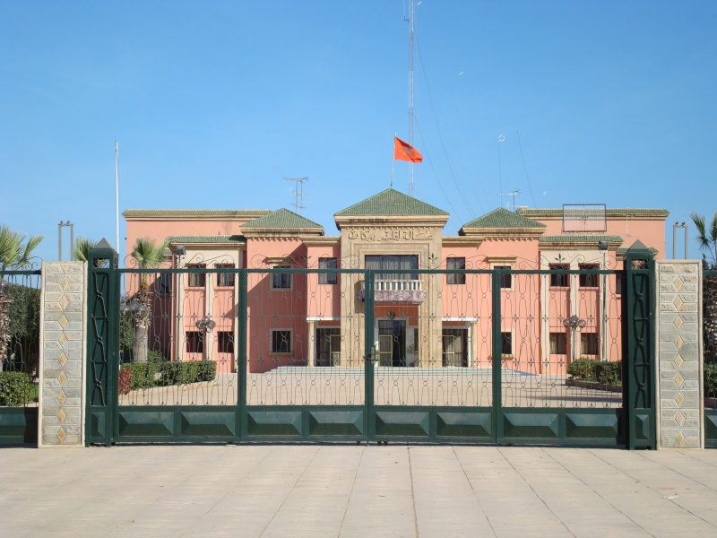 Préfecture de la Province de Berkane